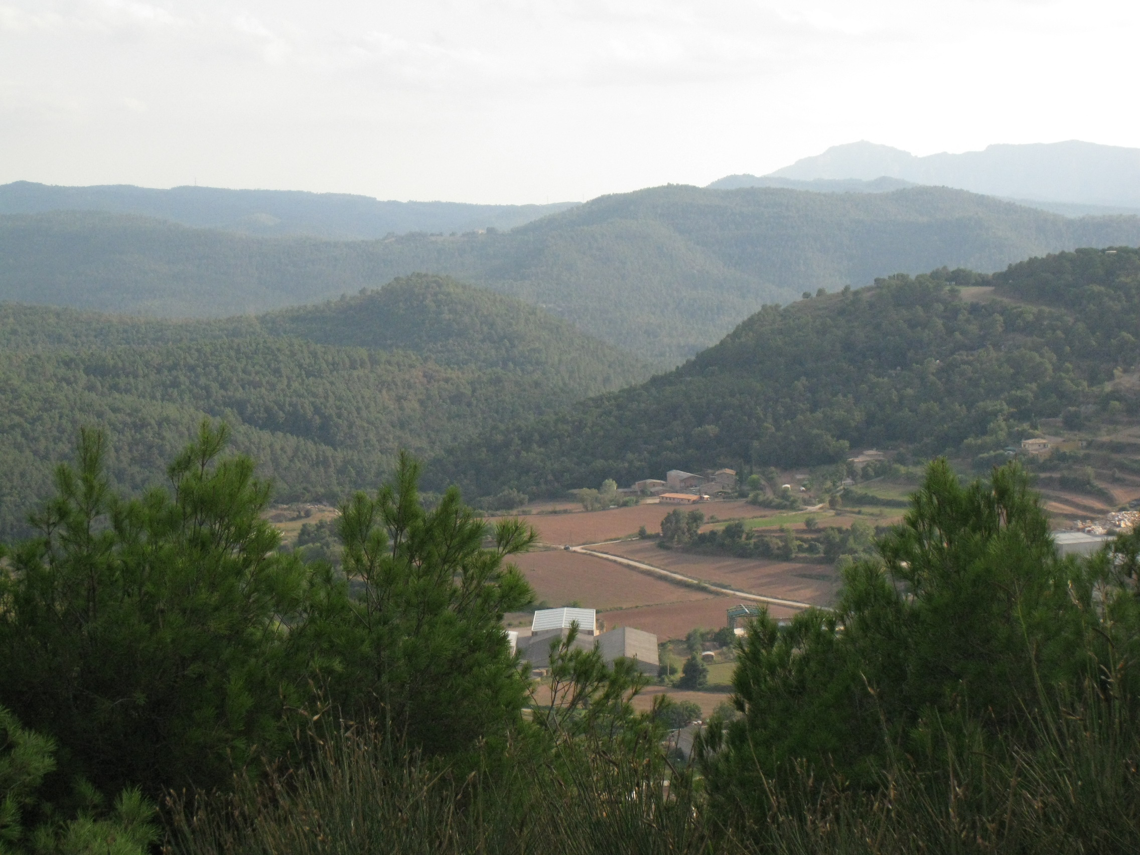 El Moianès i la Riera de Muntanyola This is a a photo of a natural area in Catalonia, Spain, with id: ES510133